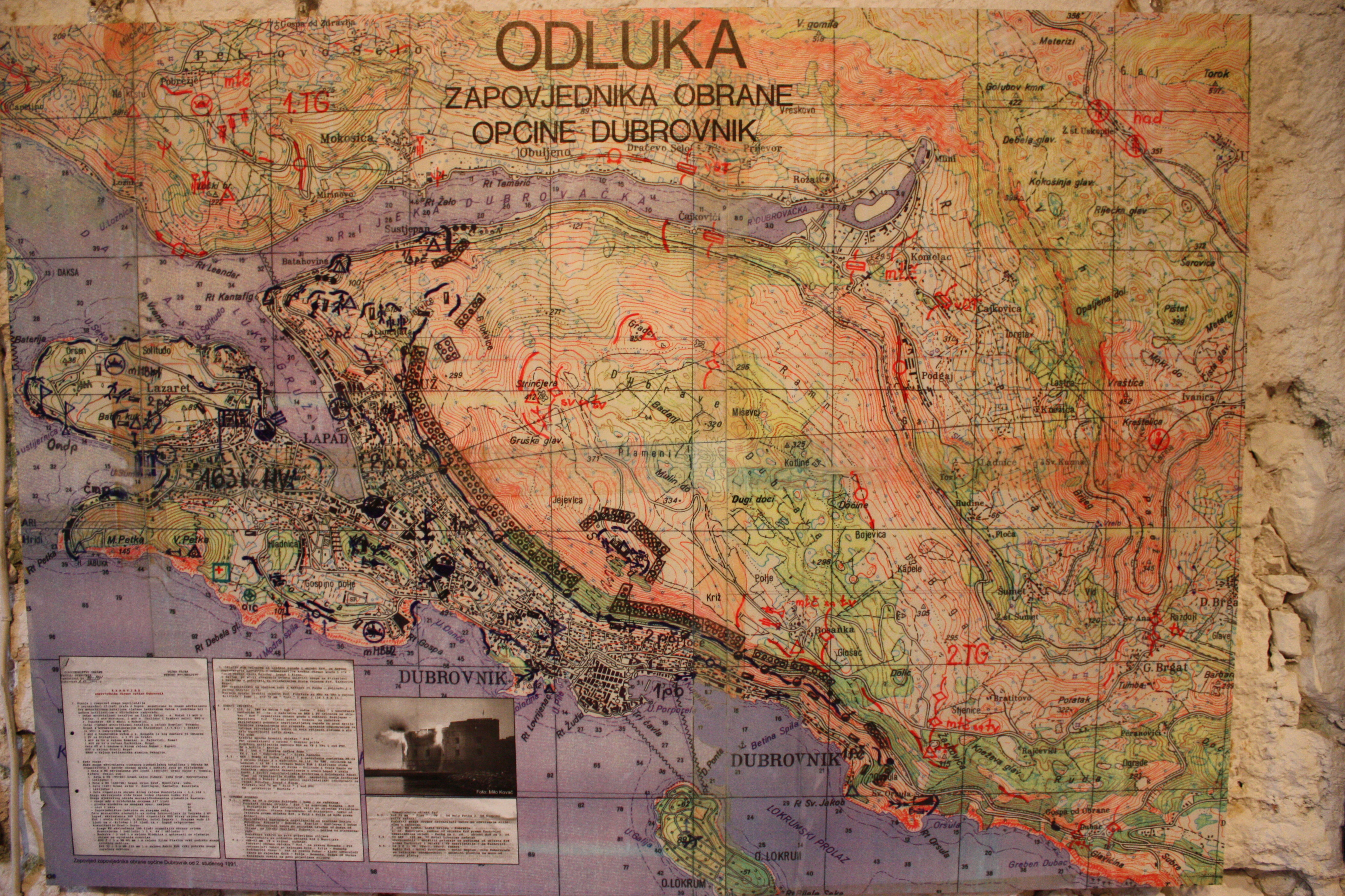 Raspored snaga obrane i okupatora (iz muzeja Domovinskog rata u Dubrovniku)